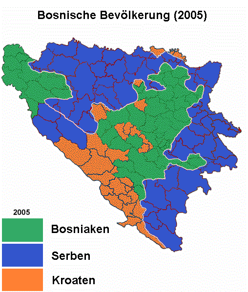 Bosnische Bevölkerung (2005)